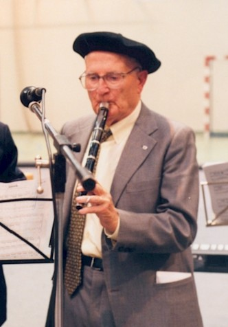 Santiago Irigoyen (Errenteria, 1997)